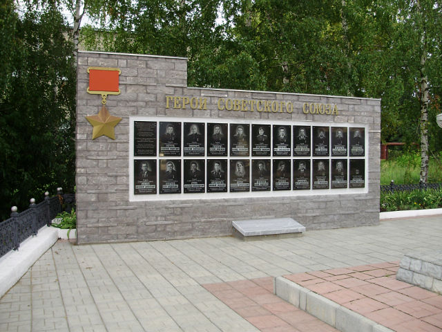 Герои советского союза родом из Шацка